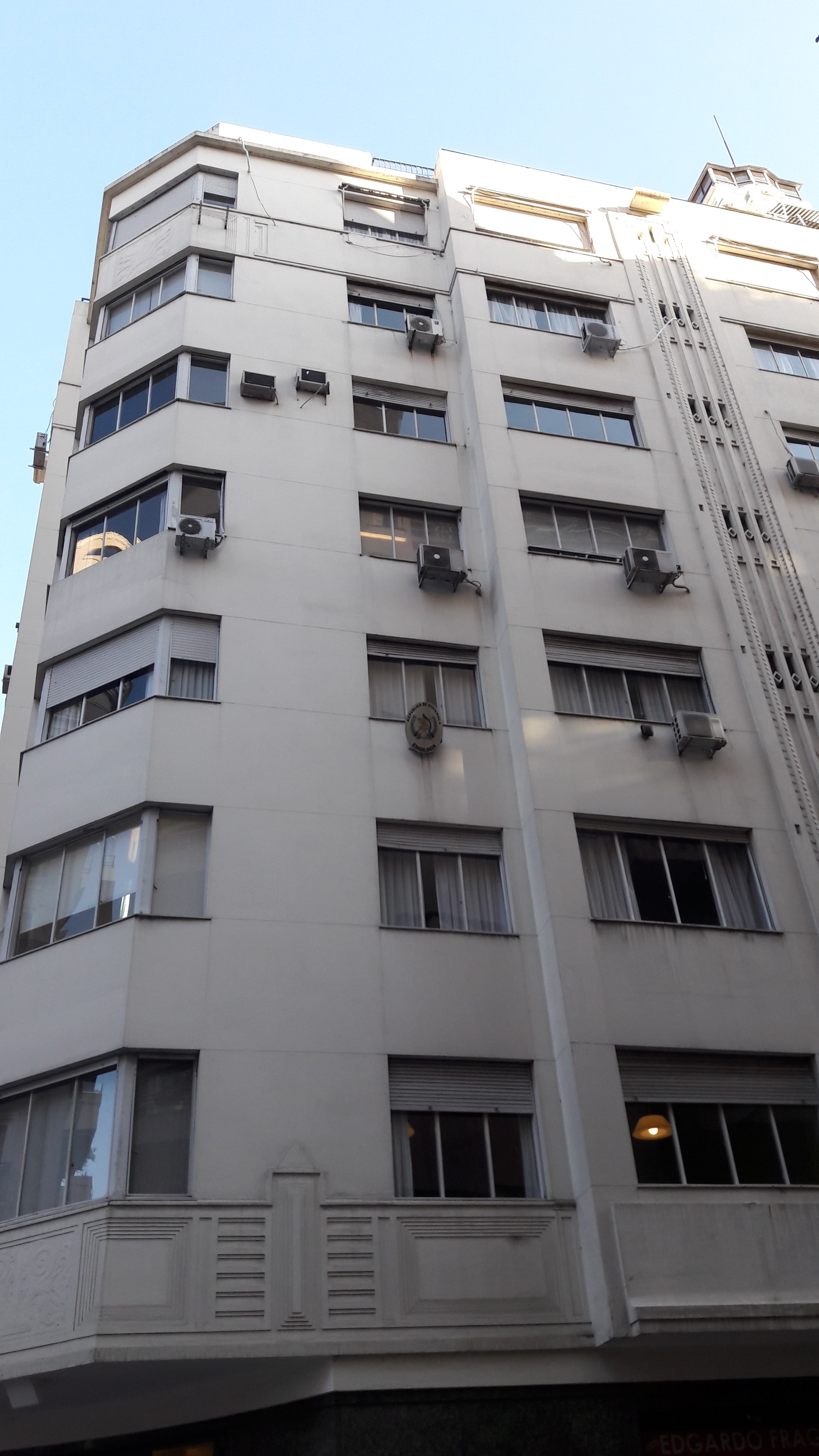 Embajada de Guatemala, Buenos Aires.